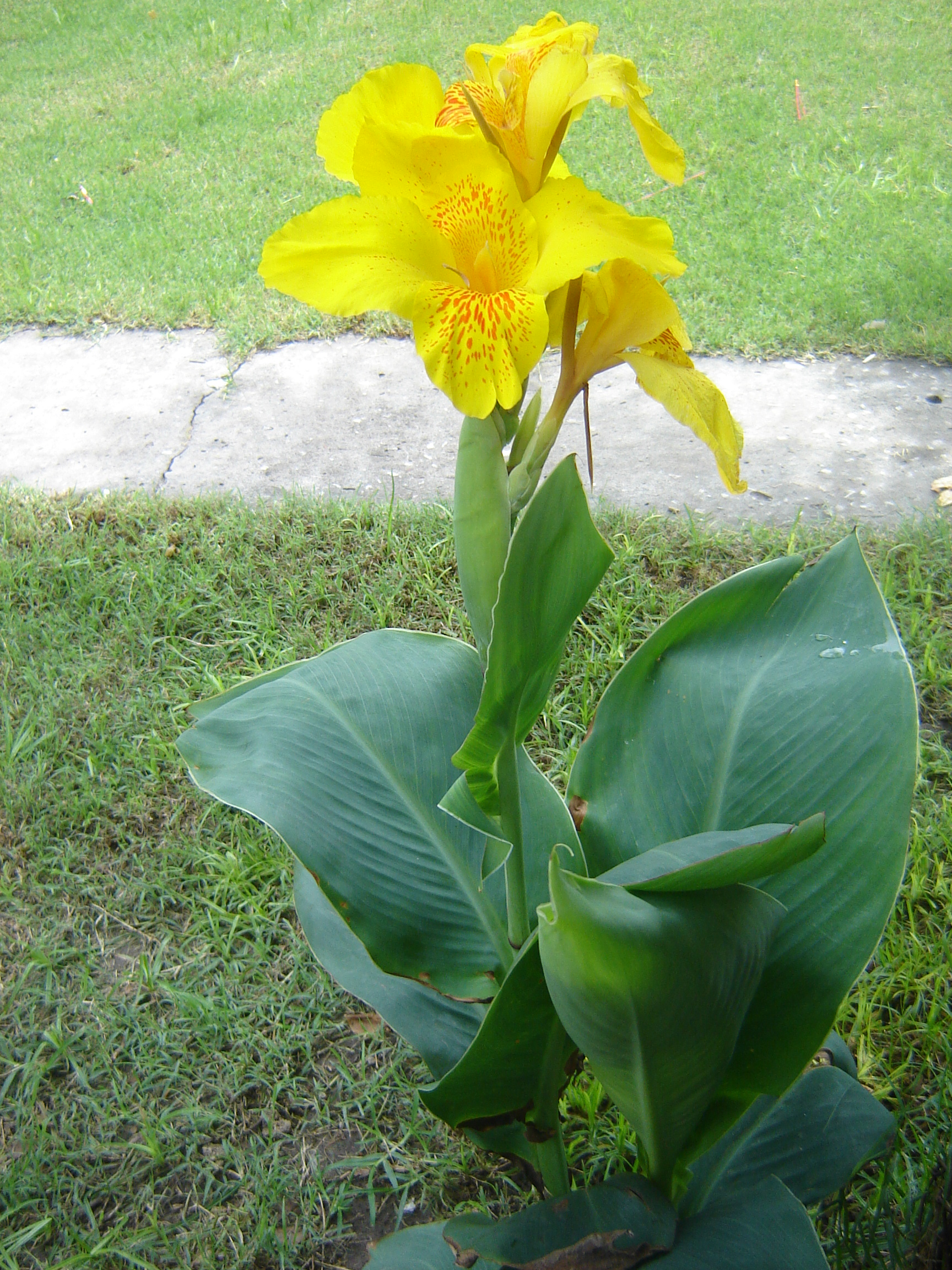 Foto: Achira de flor amarilla (Canna glauca), extraída del jardín de mi casa